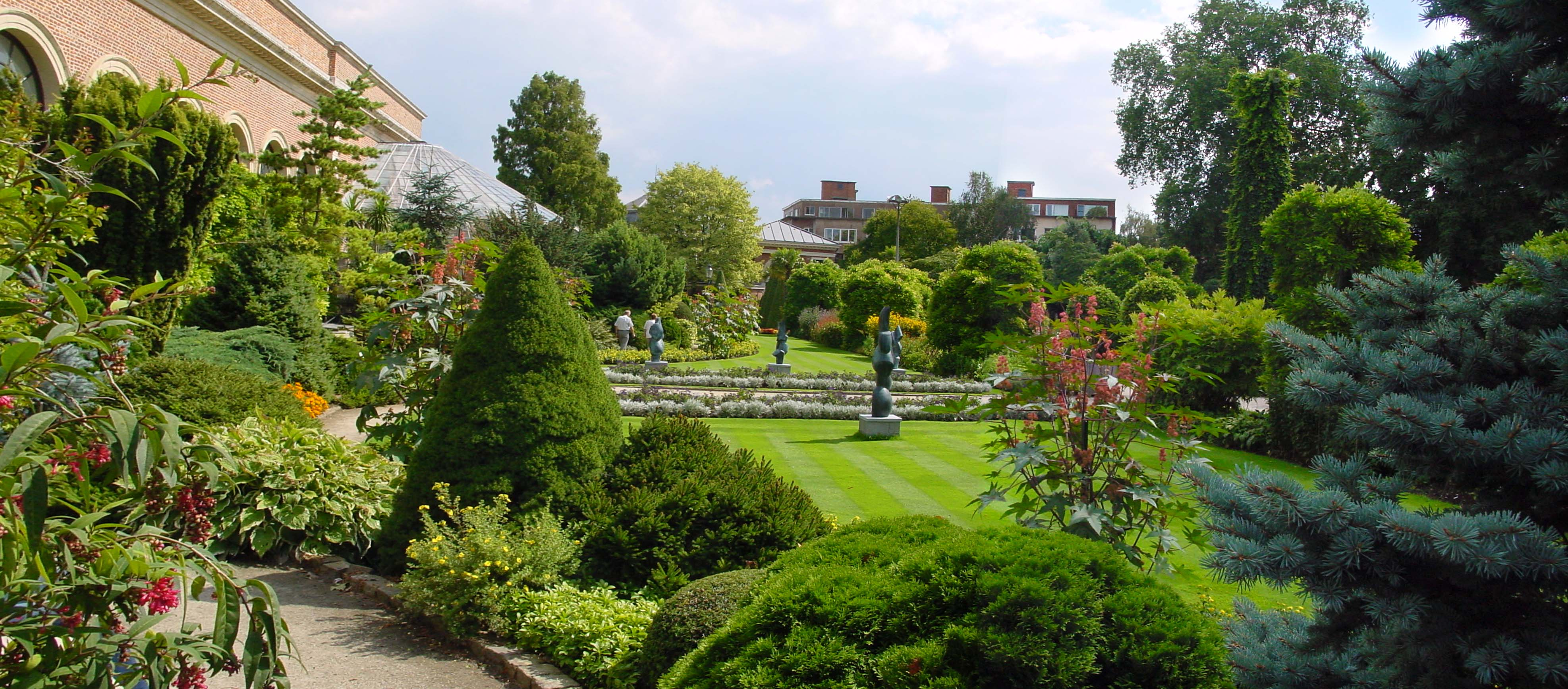 Kruidtuin gelegen aan Kapucijnenvoer, Leuven - Google Maps - Google Earth